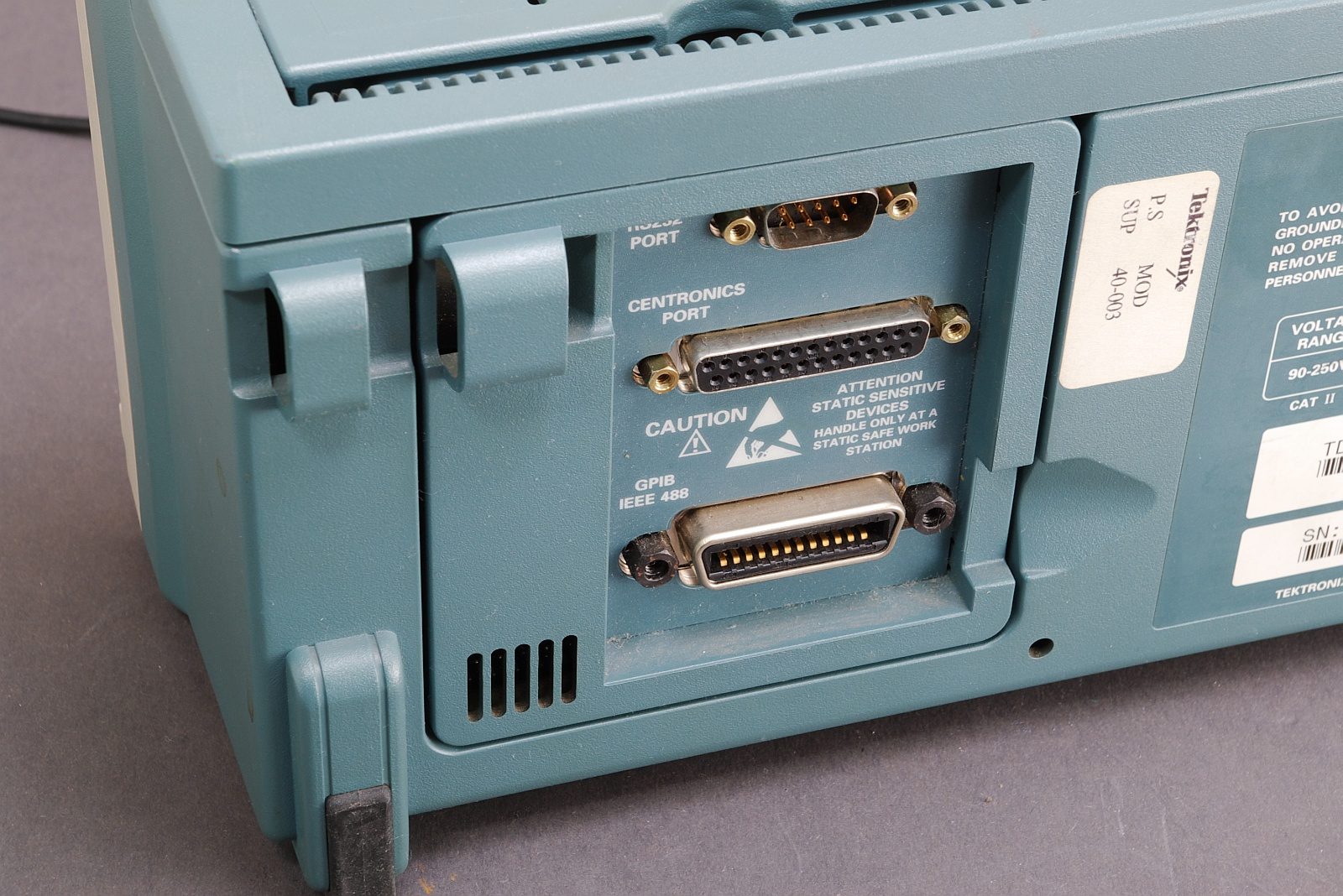 Tektronix TDS210 Digitalsoszilliskop. Optionaler Schnittstelleneinschub mit Anschlüssen für RS232, Parallelport-Drucker, GPIB